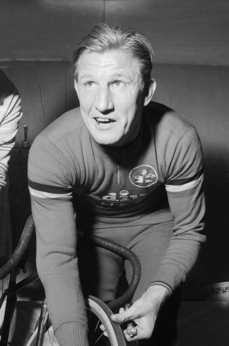 Gerrit Schulte rijdt zijn laatste wedstrijd in Antwerpen Gerrit Schulte voor de start van zijn laatste wedstrijd